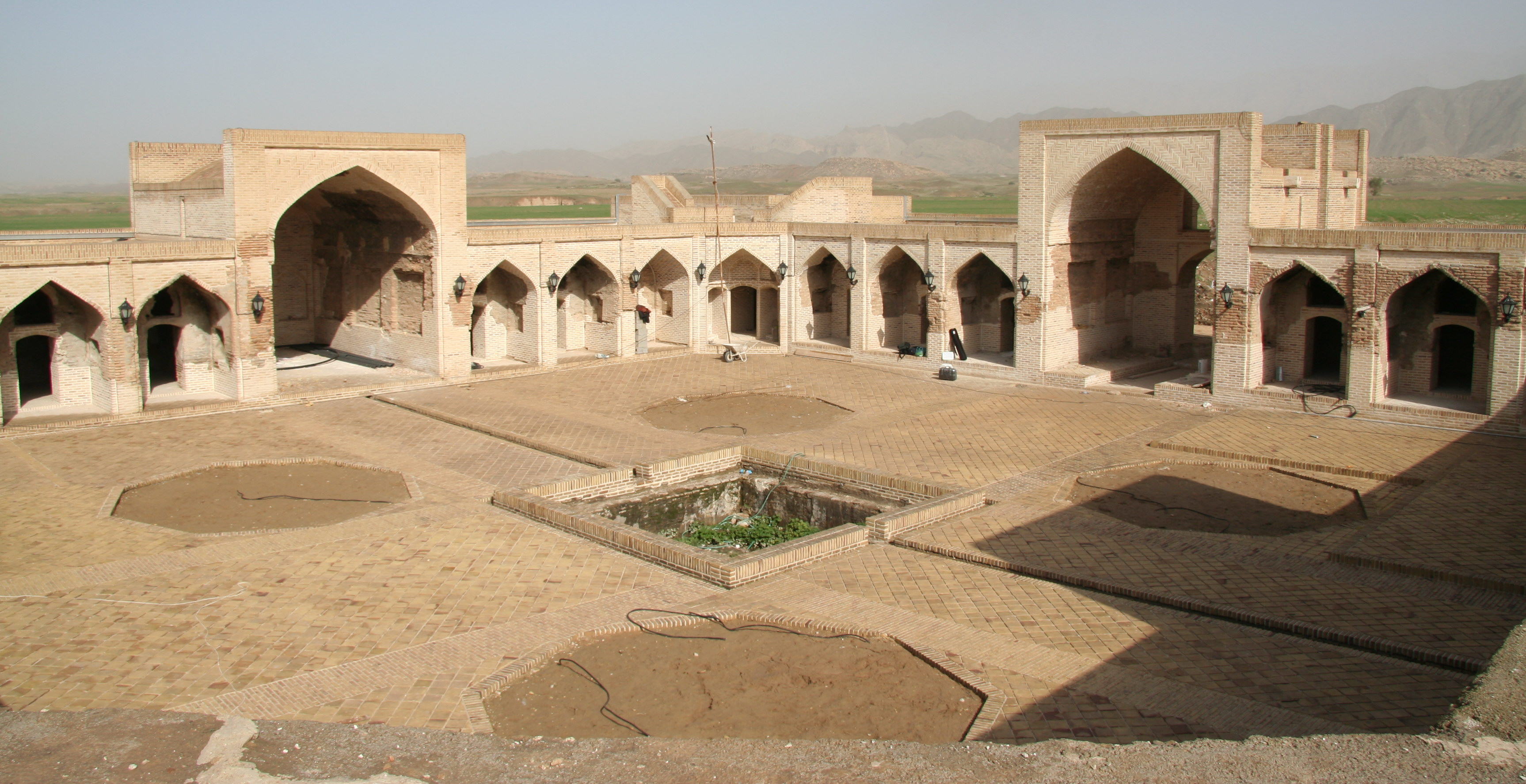 کاروانسرای خیرآباد بهبهان، همگام بازسانی